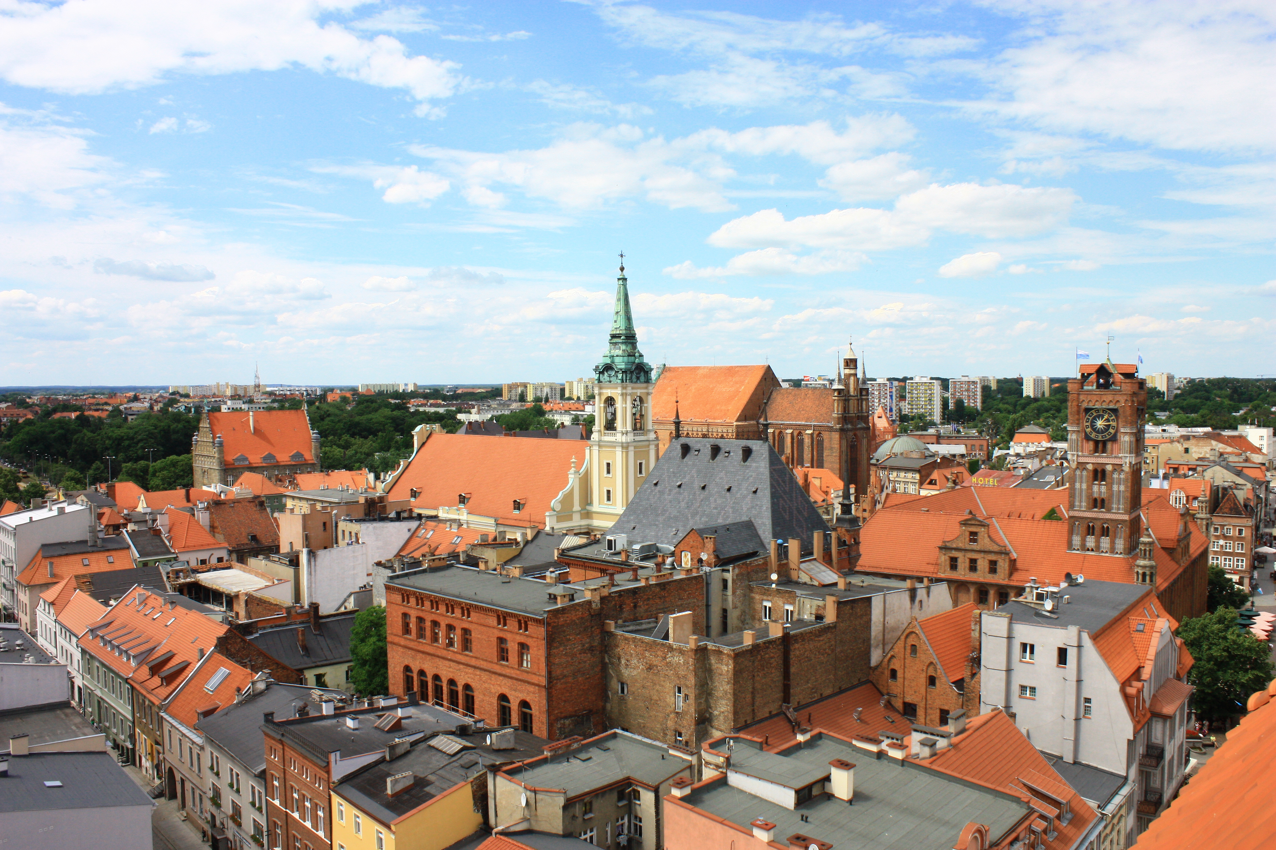 Toruń, dzielnica Starego i Nowego Miasta w obrębie murów miejskich, 1233, 1264